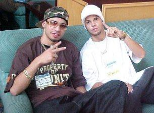 Dieses Bild zeigt Bengie und seinen Entdecker Manny Montes.